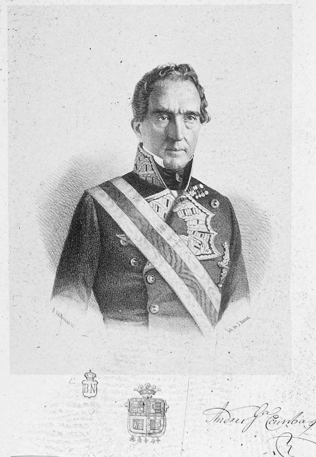 Retrato de Andrés García Camba. 1853. Litografía de Domingo Valdivieso y Henarejos. Biblioteca Nacional de España